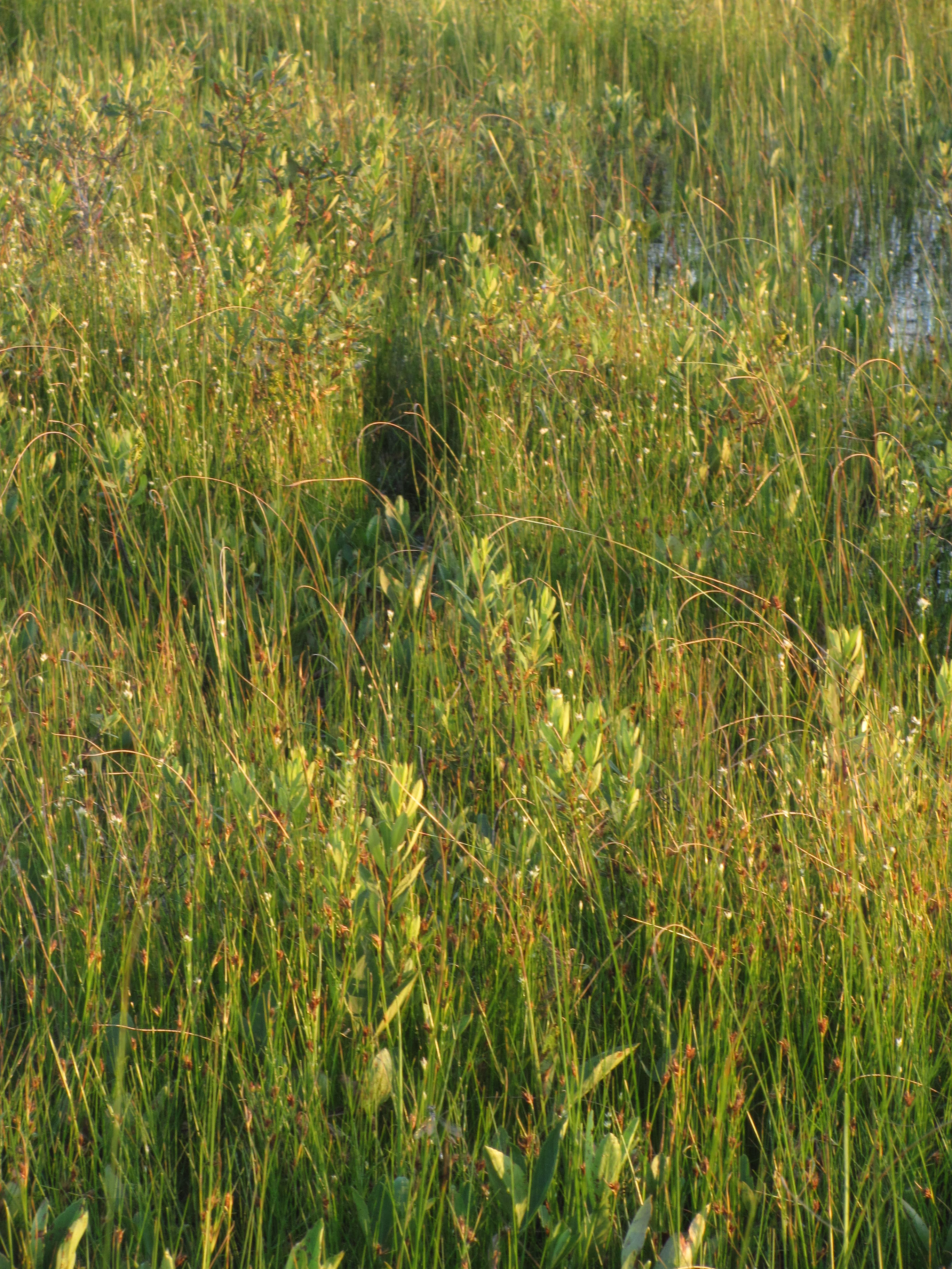 Tume nokkhein Rhynchospora fusca koos vähese hulga valge nokkheina, porsa ja lapi pajuga